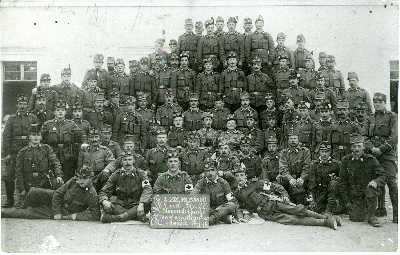 Pripadniki 4. voda avstroogrskega 27. pehotnega polka (večinoma Slovenci) na skupinski sliki.